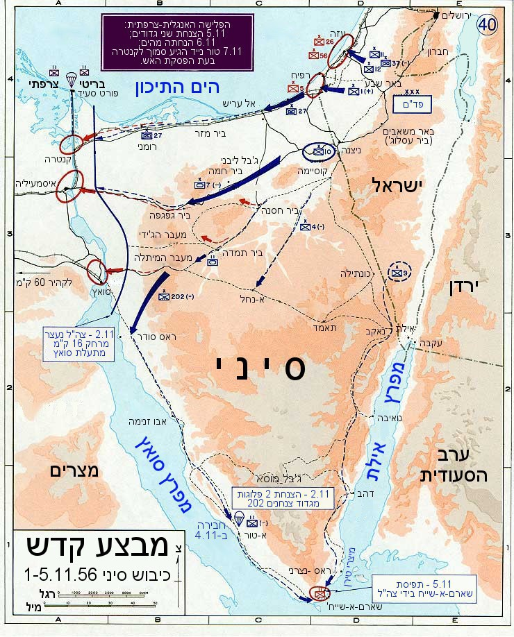 מבצע קדש